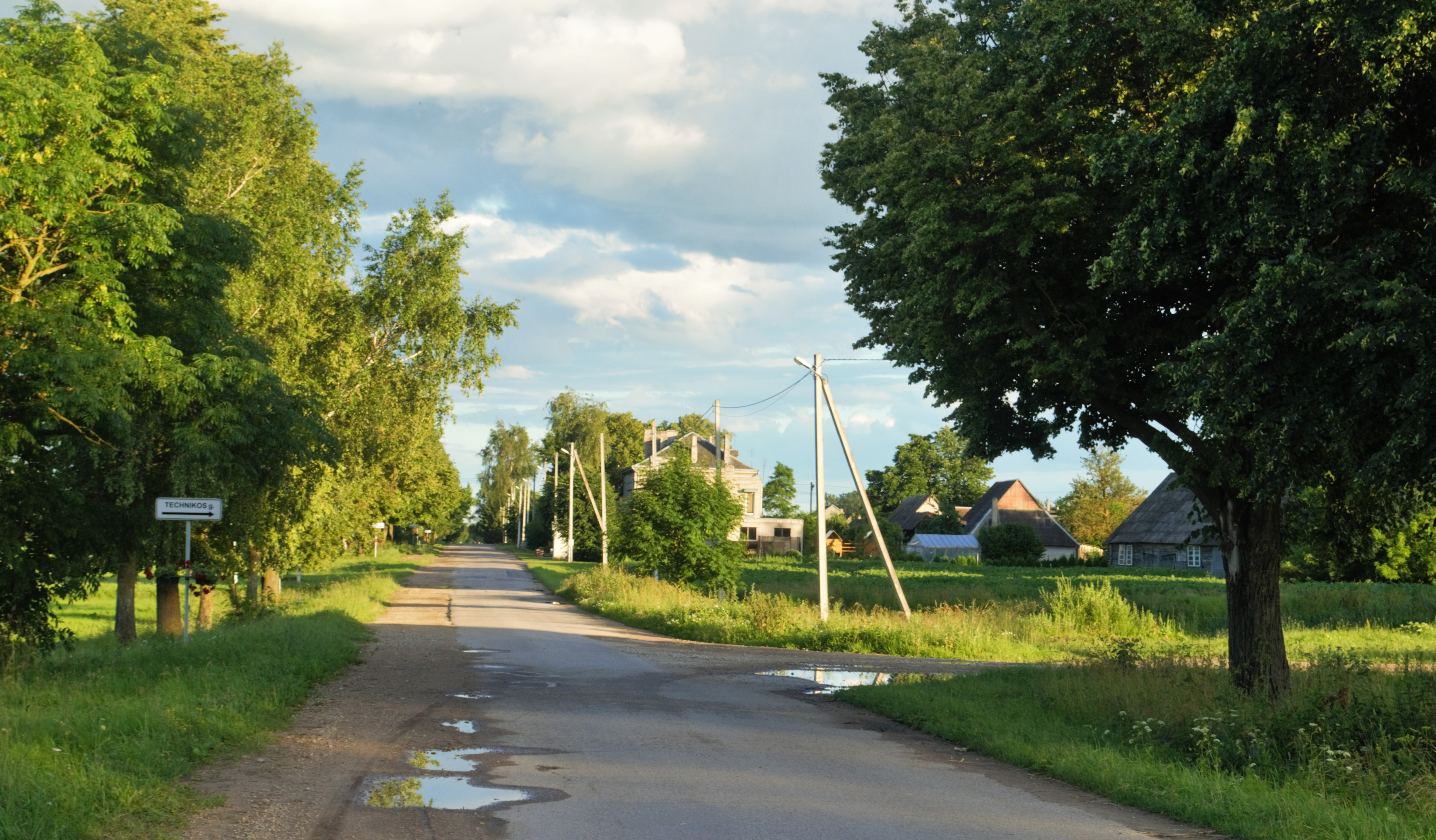 Keleriškiai, Kėdainių raj.